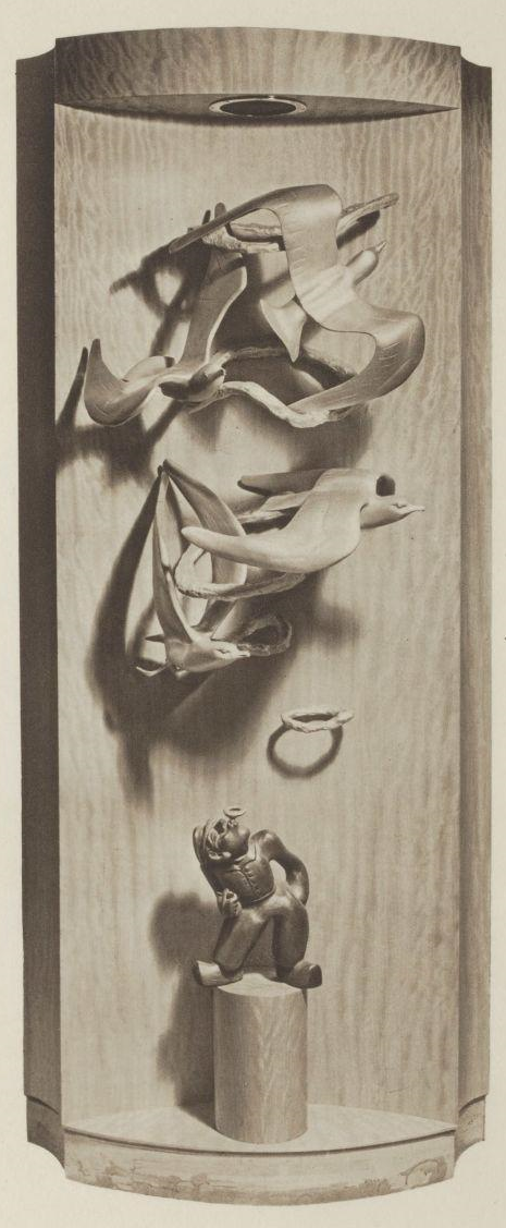 Leendert Bolle metaalplastiek Fantasieën van een rooker - 'Nieuw Amsterdam' (1938). Geplaatst in vestibule touristenklasse.